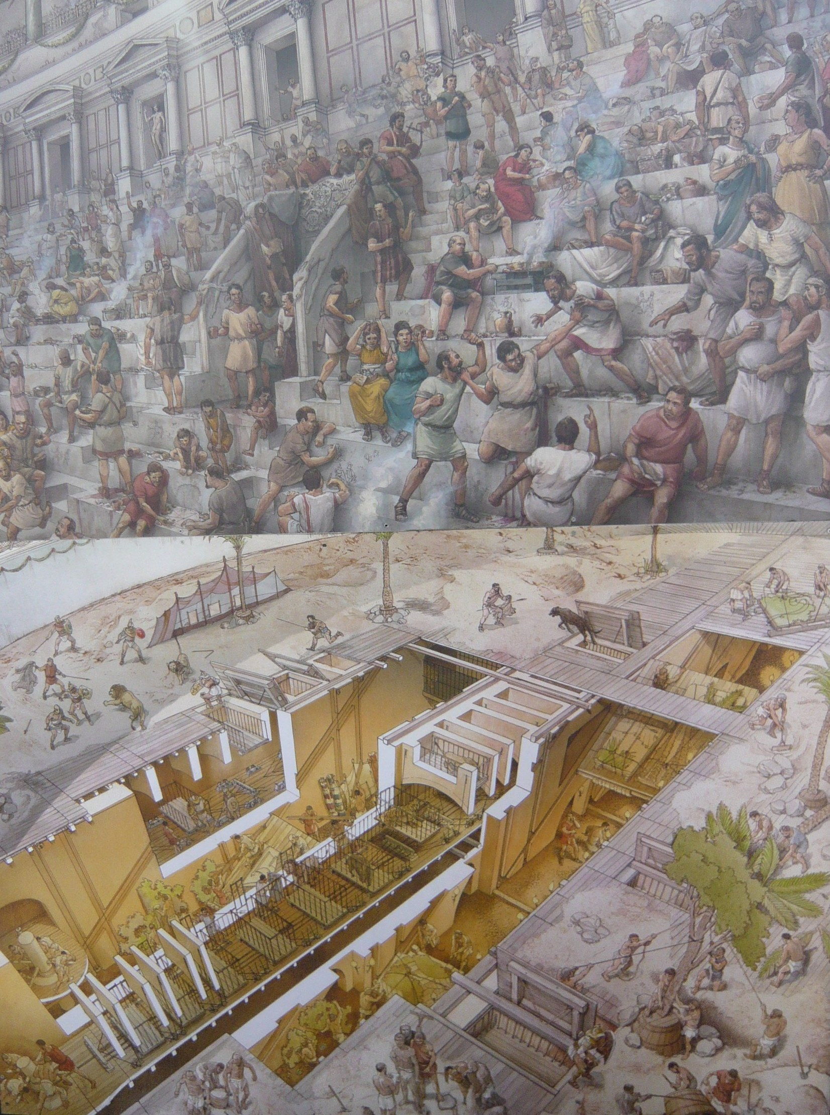 Schema explicatif de la vie dans le colisee